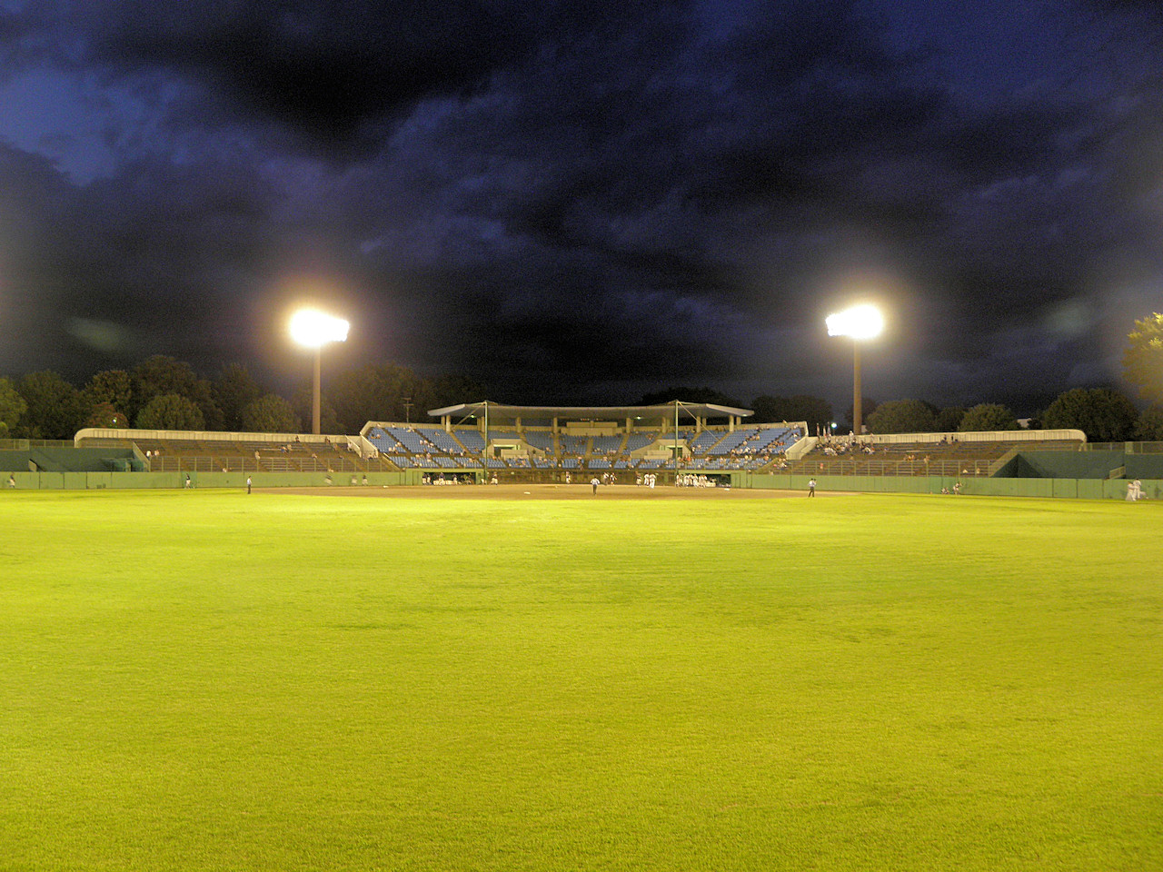 前橋総合運動公園市民球場 スタンド